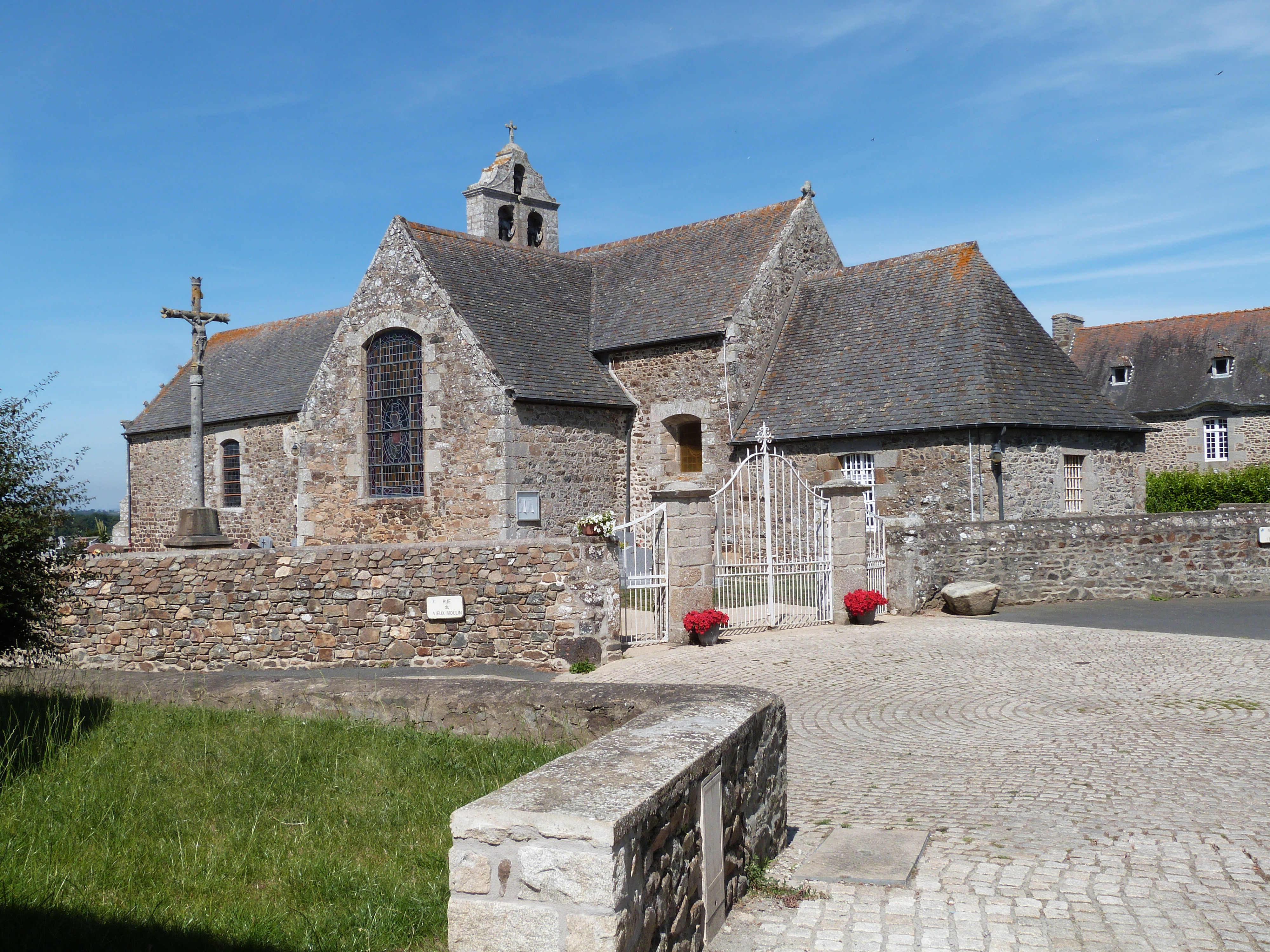 Eglise Saint-Pierre-et-Saint-Jean-Baptiste d'Andel